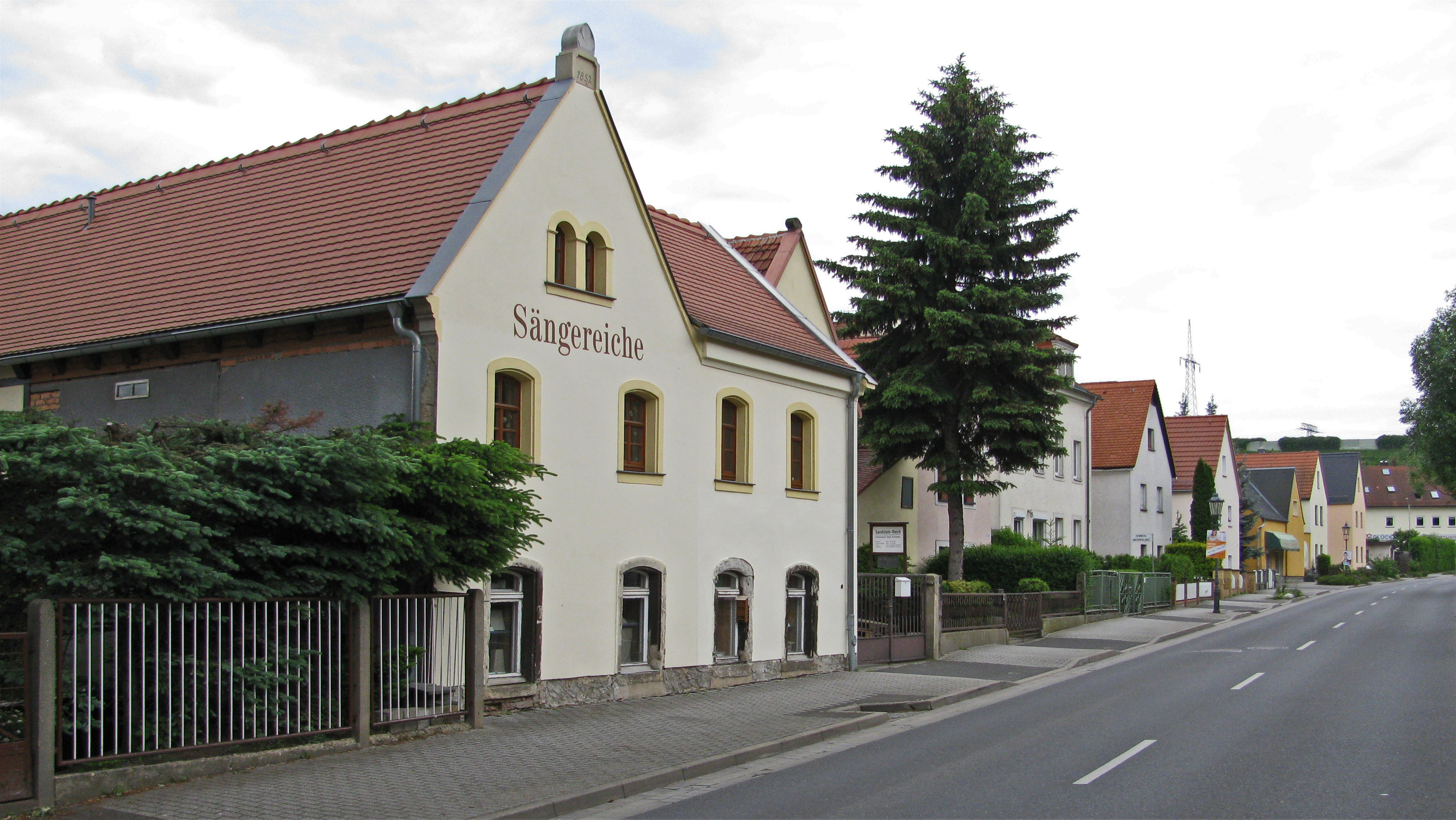 Gebäude entlang der Possendorfer Straße in Kaitz, Stadtteil von Dresden